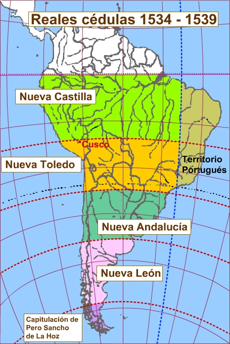 Reales Cédulas entre 1534 y 1539